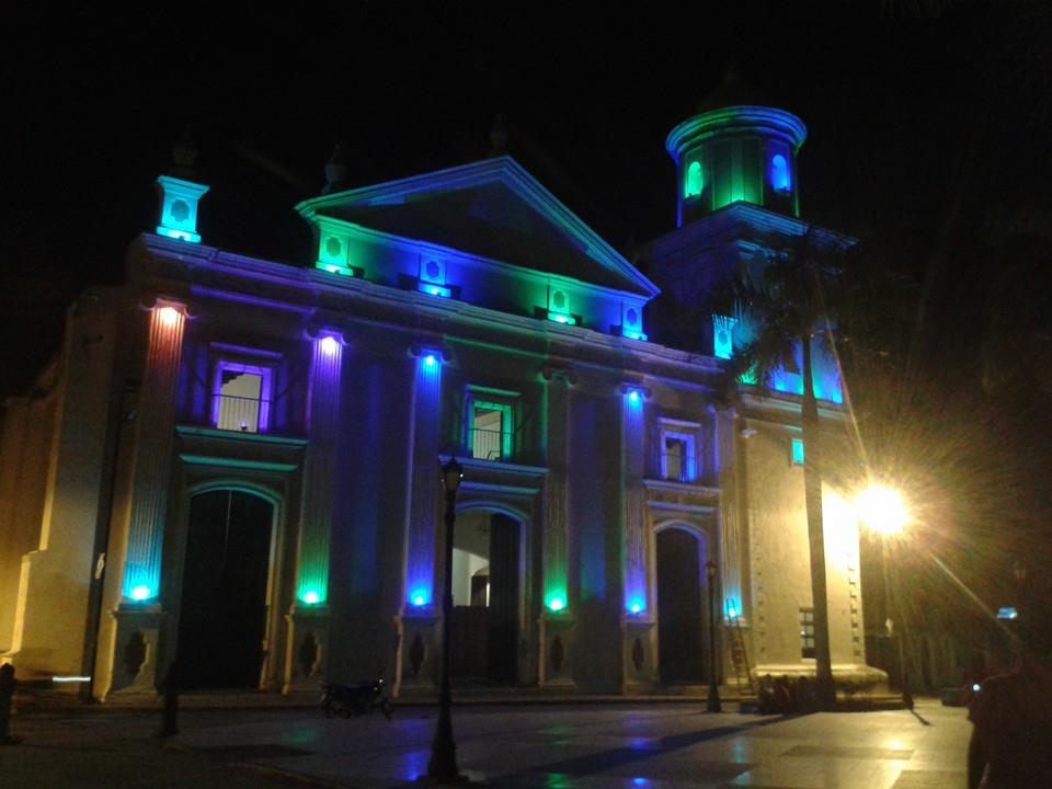 Catedral Inmaculada Concepción iluminación.